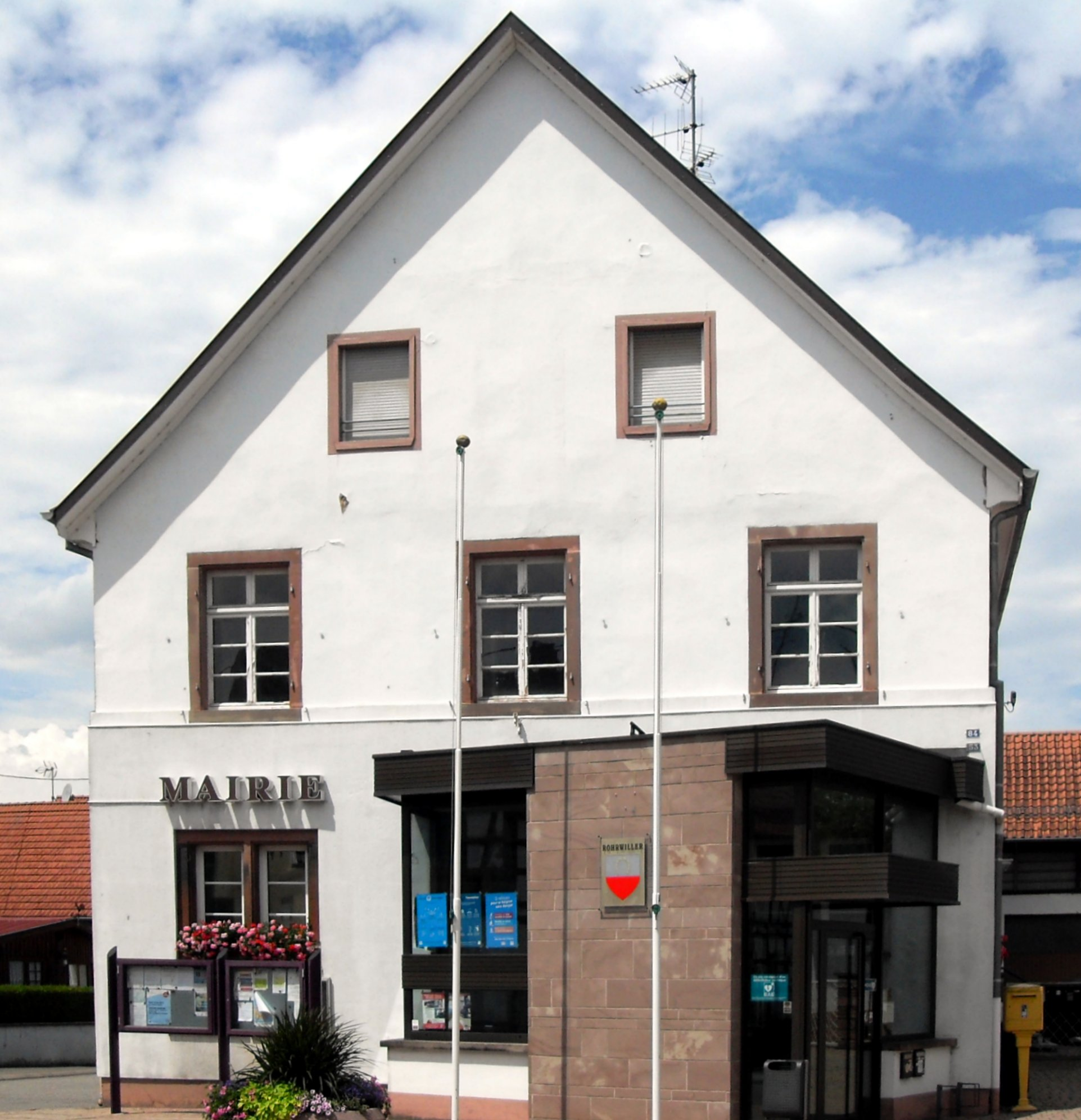 La mairie de Rohrwiller